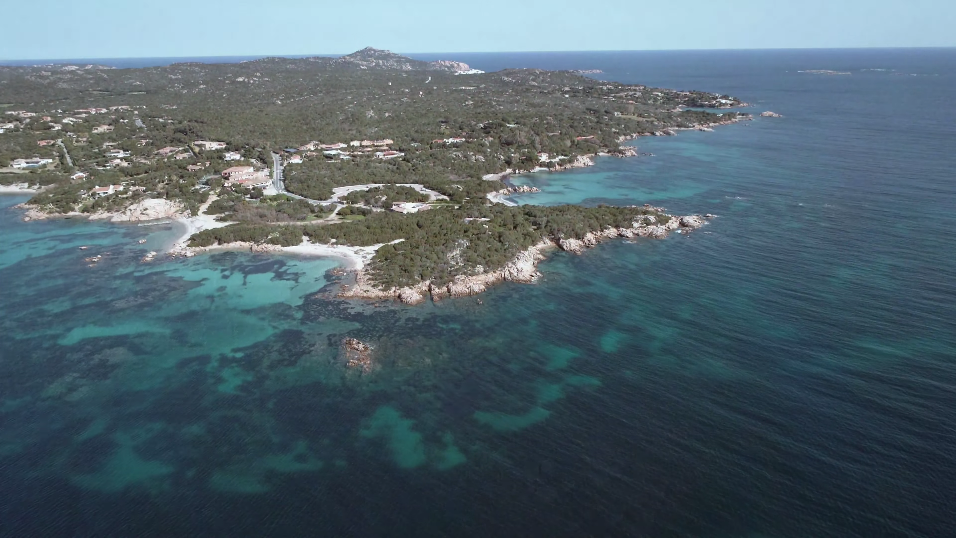 Vue panoramique de la Costa Smeralda